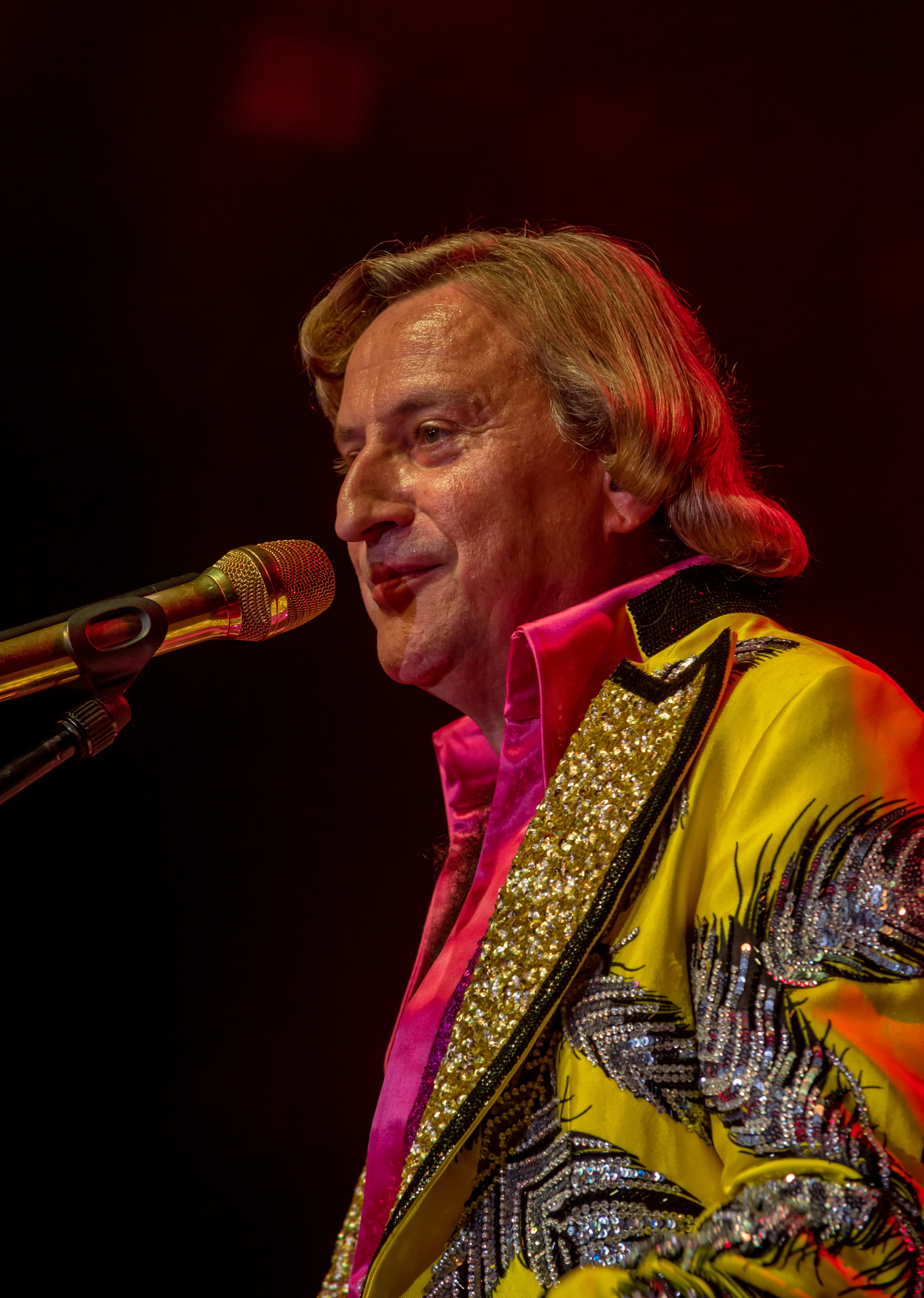 Bilder vom Zelt Musik Festival 2017 in Freiburg im Breisgau Das erste von zwei Konzerten von DTK auf dem ZMF in Freiburg (07.07.2017 und 14.07. 2017) beide ausverkauft